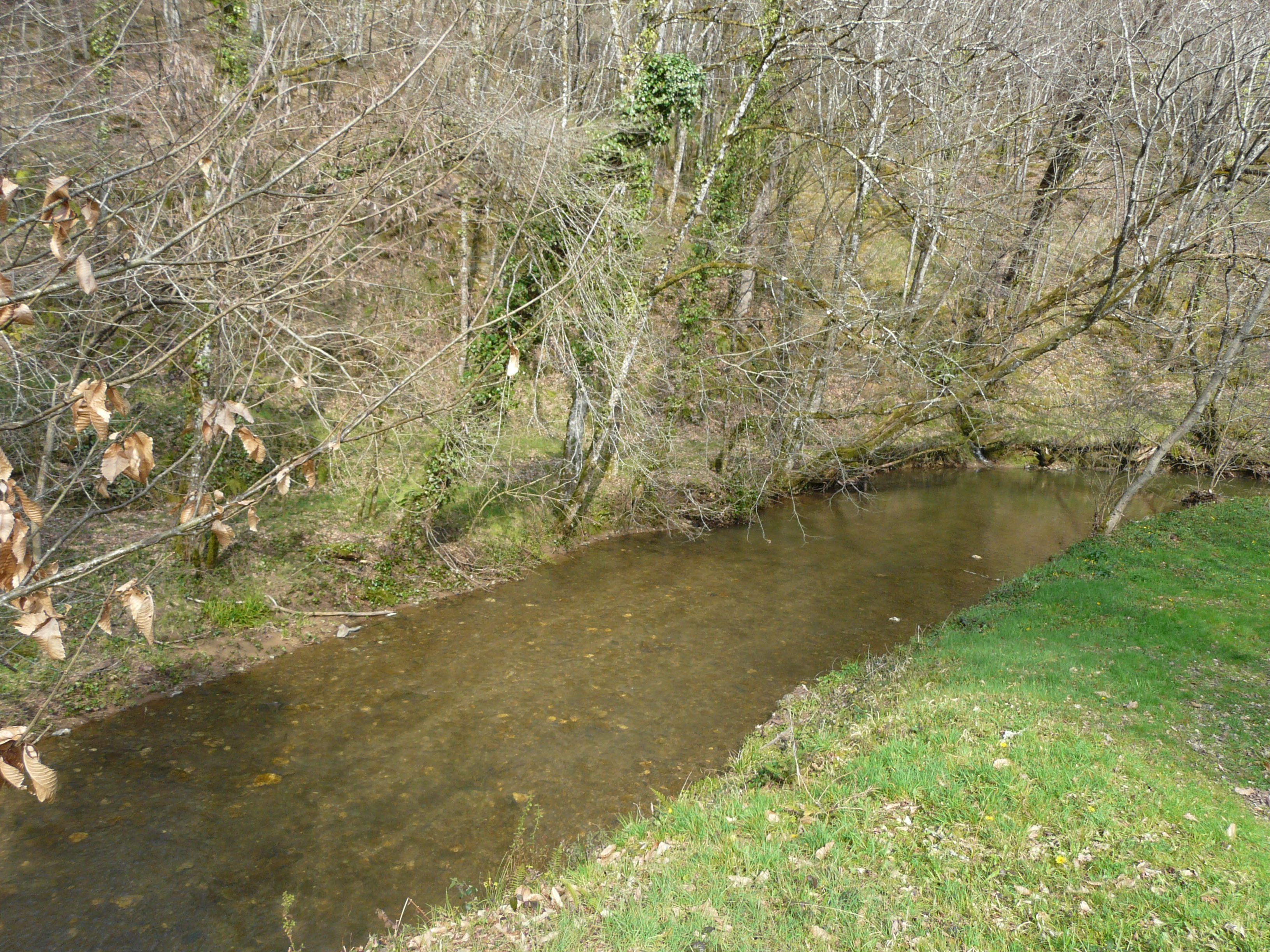 Le Taravellou en aval du pont au nord du lieu-dit Bord, en limite des communes de Châtres (à gauche) et Saint-Rabier (à droite), Dordogne, France.